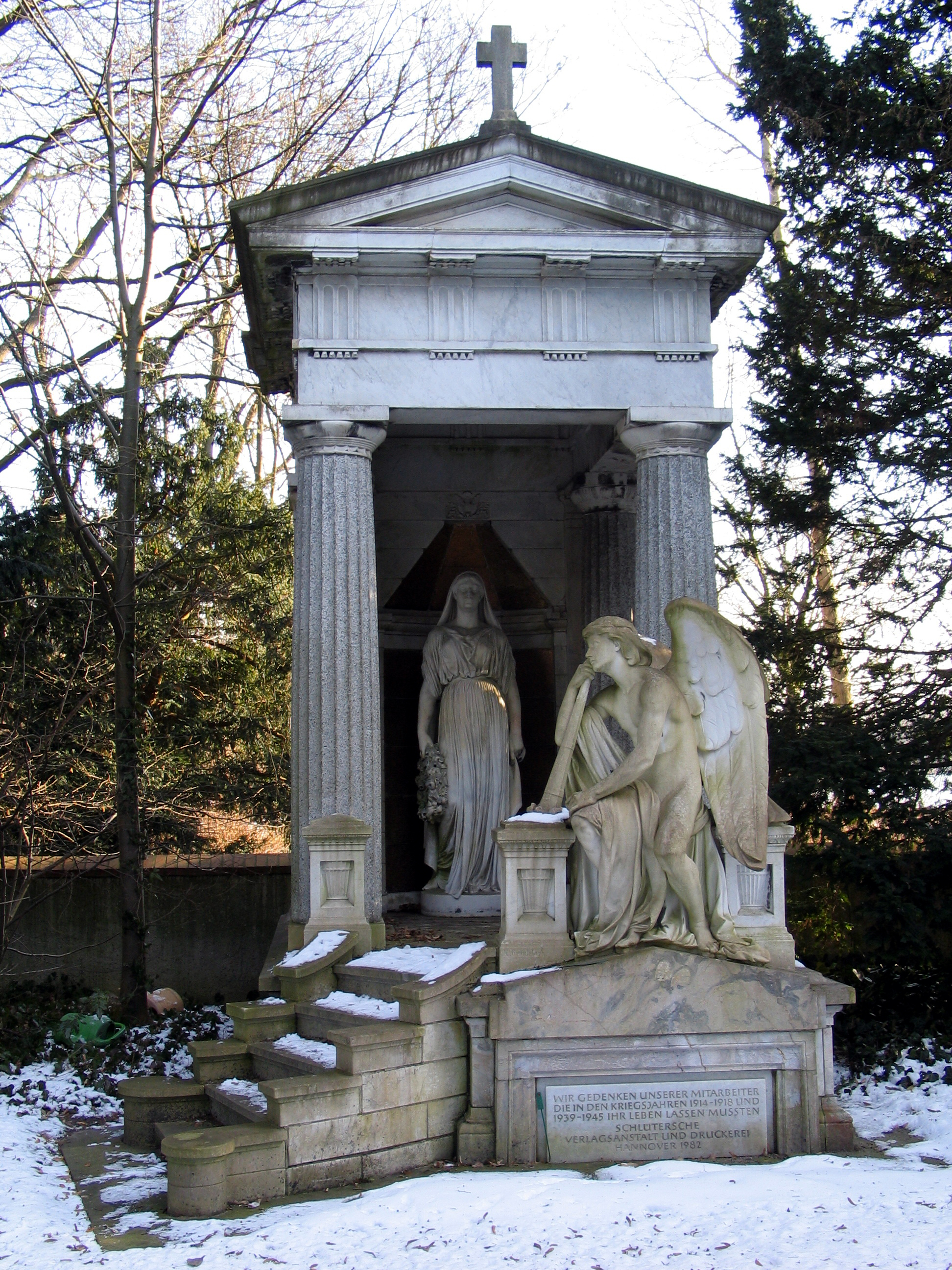 Das von dem Bildhauer Karl Gundelach für die Familie um Hermann Wilhelm Schlüter geschaffene Grabmal auf dem Stadtfriedhof Engesohde, heutige Abteilung 25, Grabmäler Nummern 25-30 ...